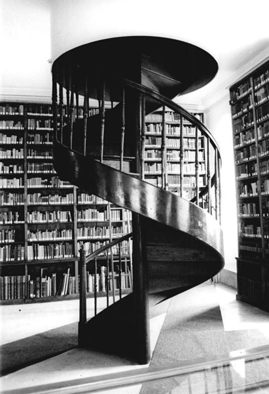 Gotha, Schloss Friedenstein, Bibliothek ADN-ZB Ludwig-17.4.85 Bez. Erfurt: Gerettete Bücherschätze- Rund 500.000 Bände umfaßt die "Forschungsbibliothek Gotha", die 1945 von der UdSSR sichergestellt und 1956 an die DDR zurückgegeben wurde. Eine Wendeltreppe verbindet übereinanderliegende Säle im Schloß Friedenstein. Unter den Büchern befinden sich wertvolle historische Ausgaben wie eine arabische Handschrift aus dem 8. Jahrhundert, eine türkische Handschrift aus dem 14. Jahrhundert und ein hebräisches Wörterbuch aus dem 16. Jahrhundert. (siehe 12 und 14 N)